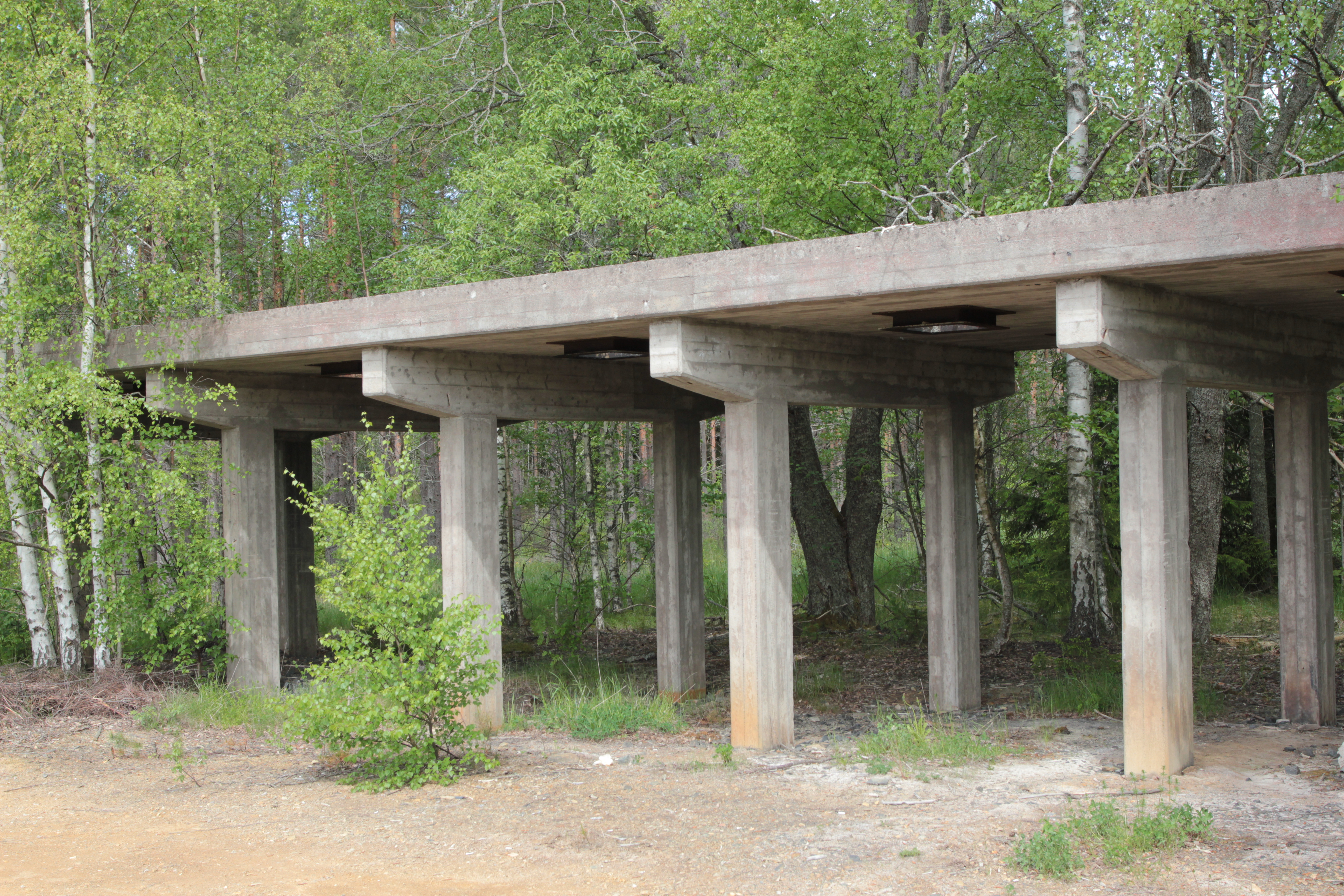 Strömhagsgruvan. Foto uppladdat som en del i Bergslagssafarin 26 maj 2012.